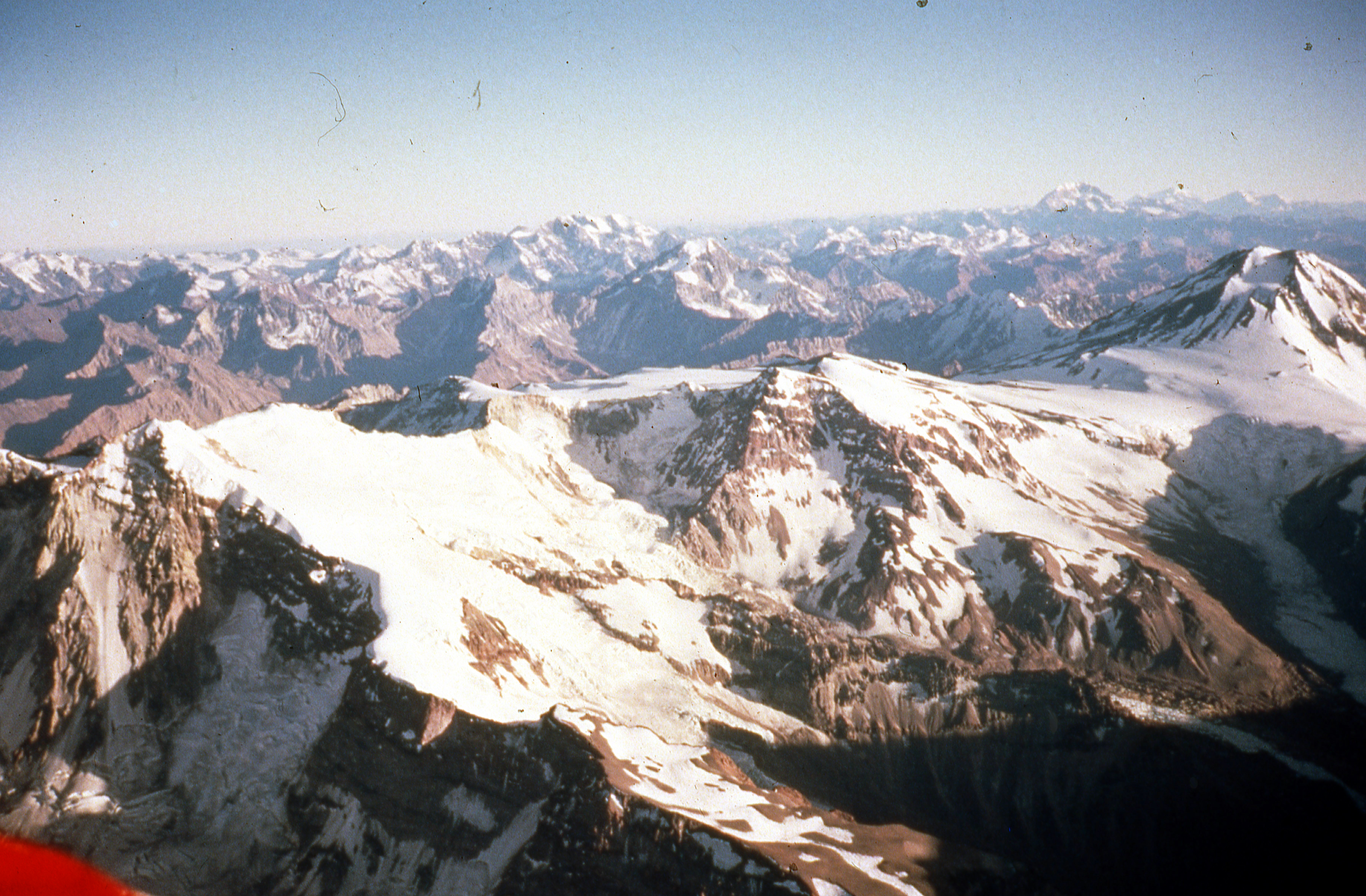 Fotografía de la cordillera de Los Andes tomada desde uno de los globos.